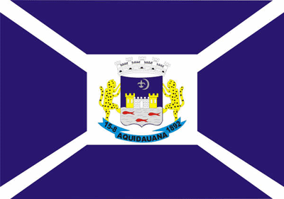 Bandeira de Aquidauana